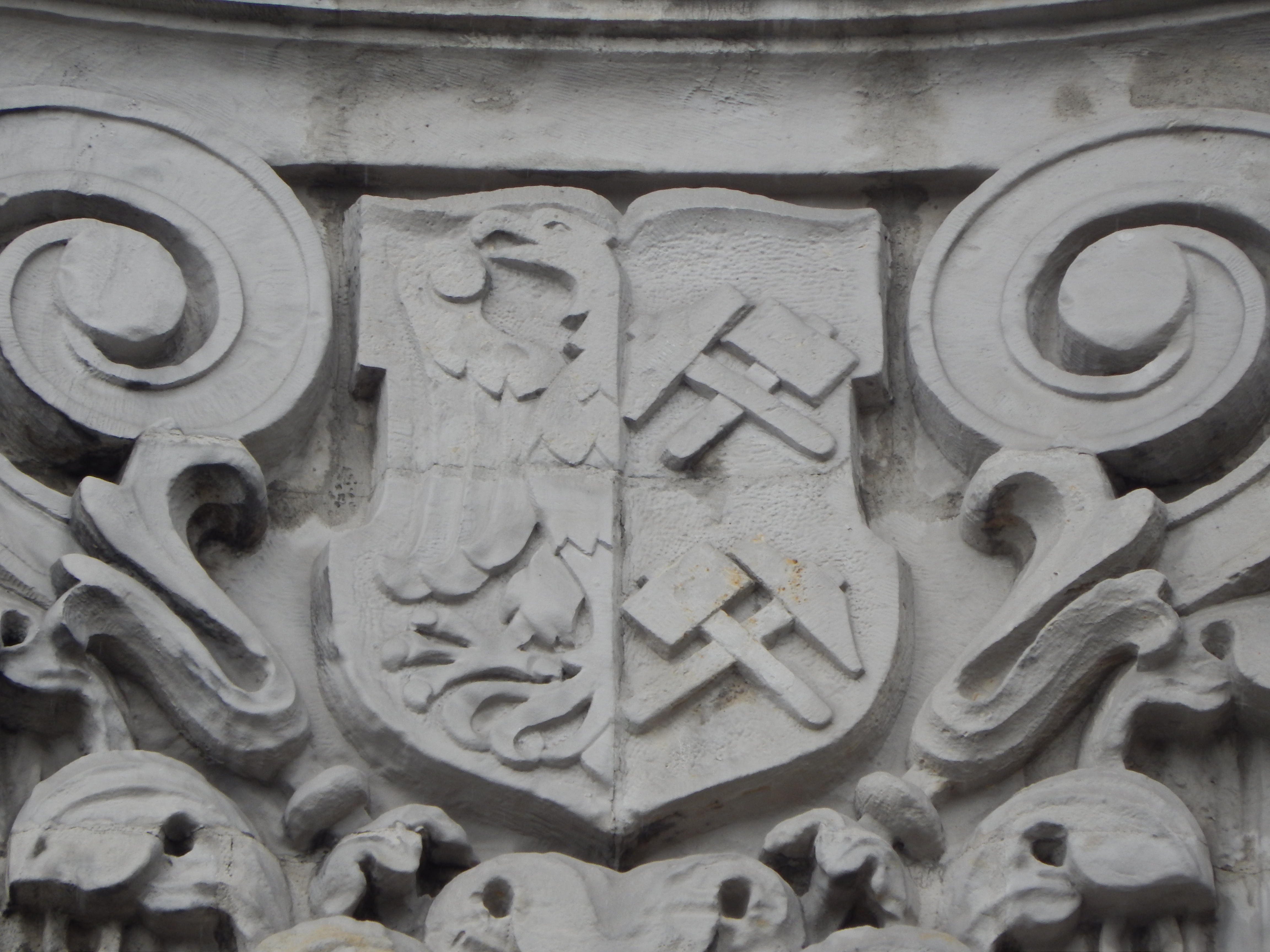 Fragment elewacji gmachu Sejmu Śląskiego - herb 2